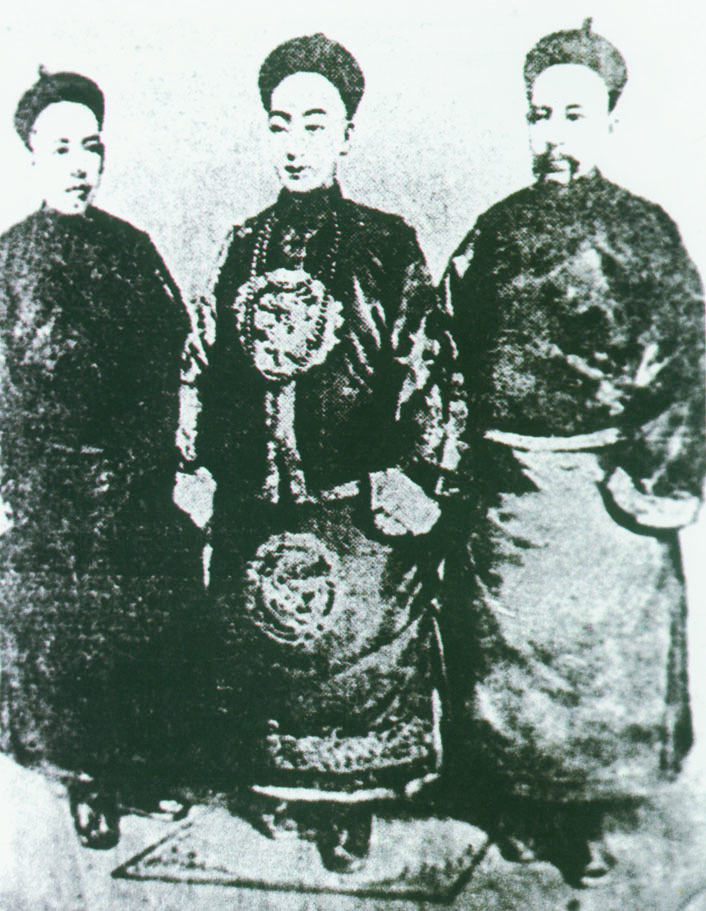 Император Гуансюй с Кан Ювэем и Лян Цичао